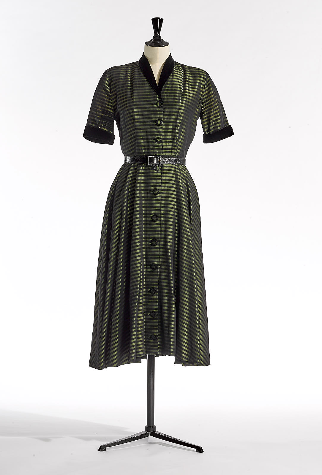 Kuit- tot enkellange japon in doorknoopmodel, type cocktailjurk, van groen-zwart gestreept synthetisch materiaal. Knopen zijn overtrokken met zwart fluweel (rand) hetzelfde materiaal als de jurk. De mouwen en sjaalkraag zijn van zwart fluweel. Ingenaaide schoudervullingen van hetzelfde materiaal als de jurk.